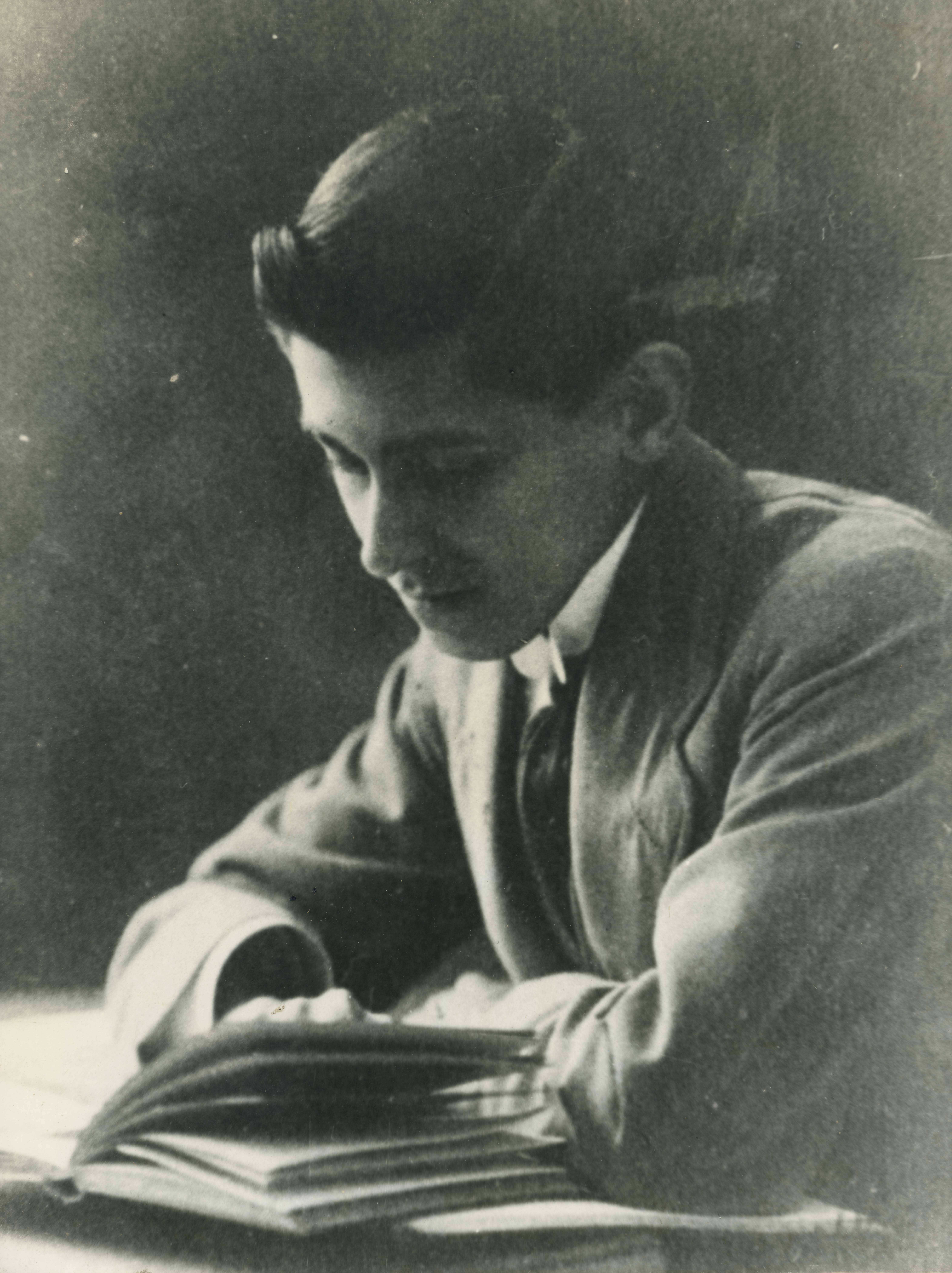 Retrato de José Carlos Mariátegui aparecido en varios periódicos limeños. 1917